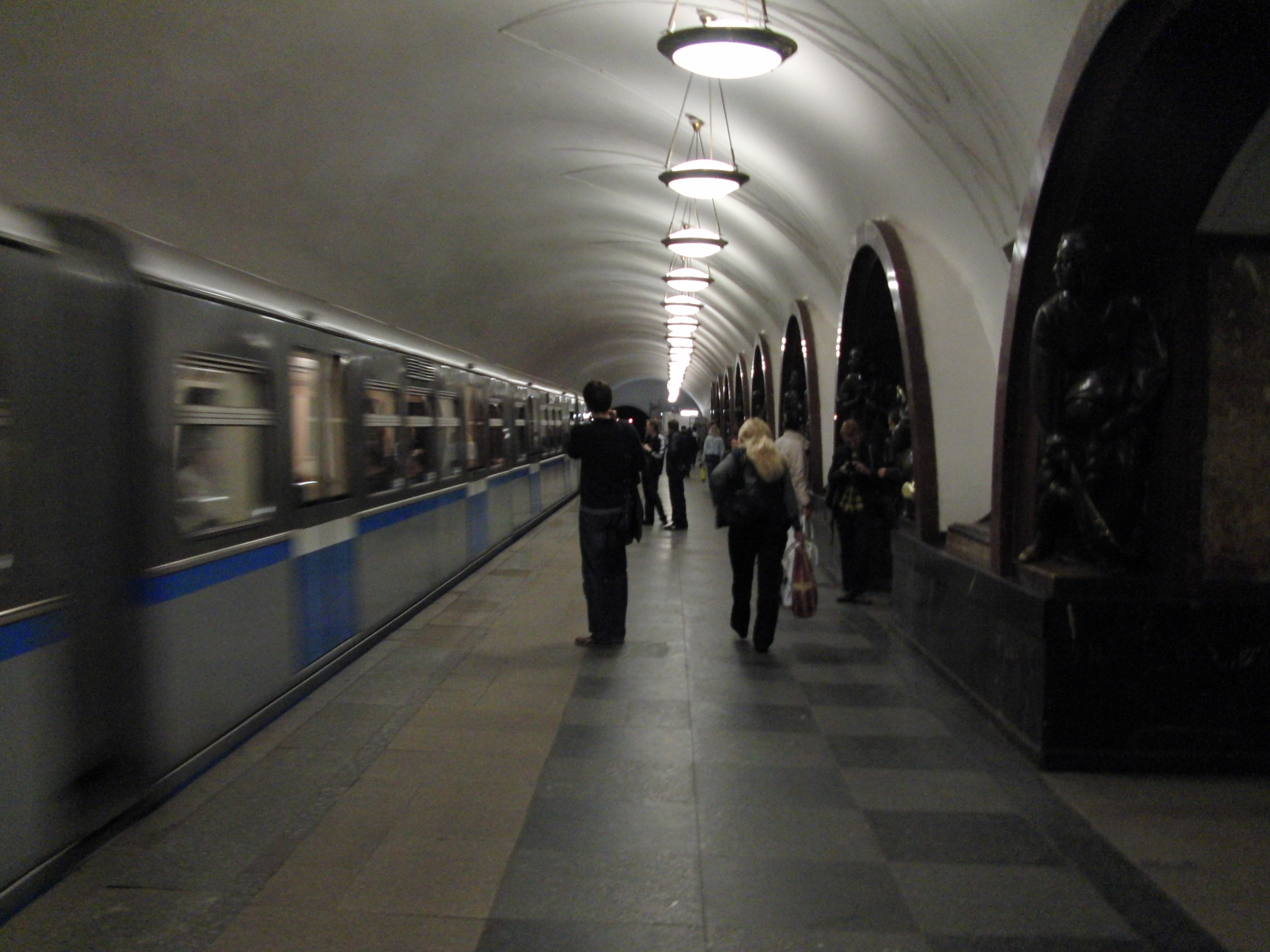 Ploshchad Revolyutsii (Площадь Революции)